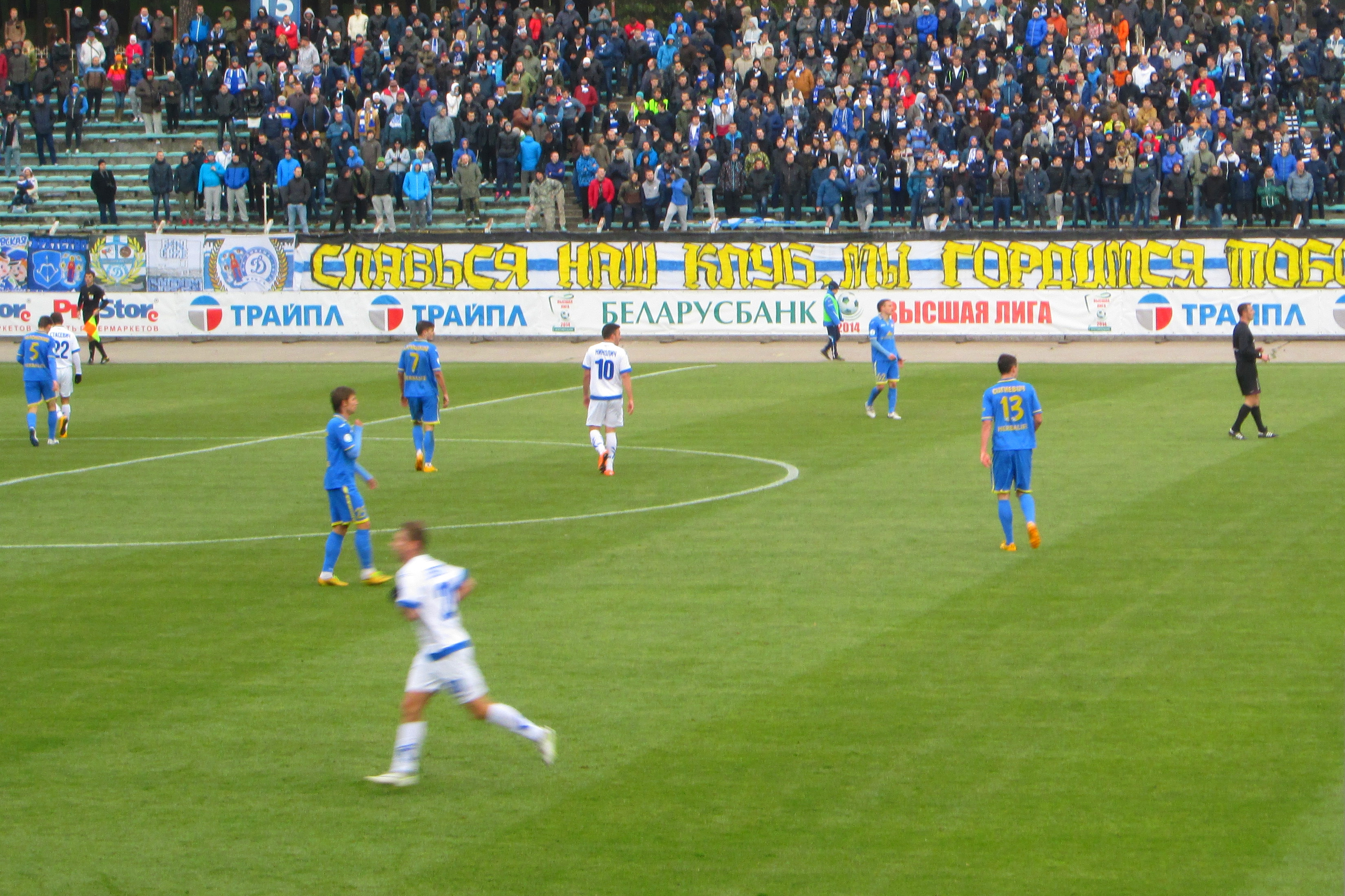 Матч «Динамо» (Минск) - БАТЭ, стадион «Трактор», 1 ноября 2014